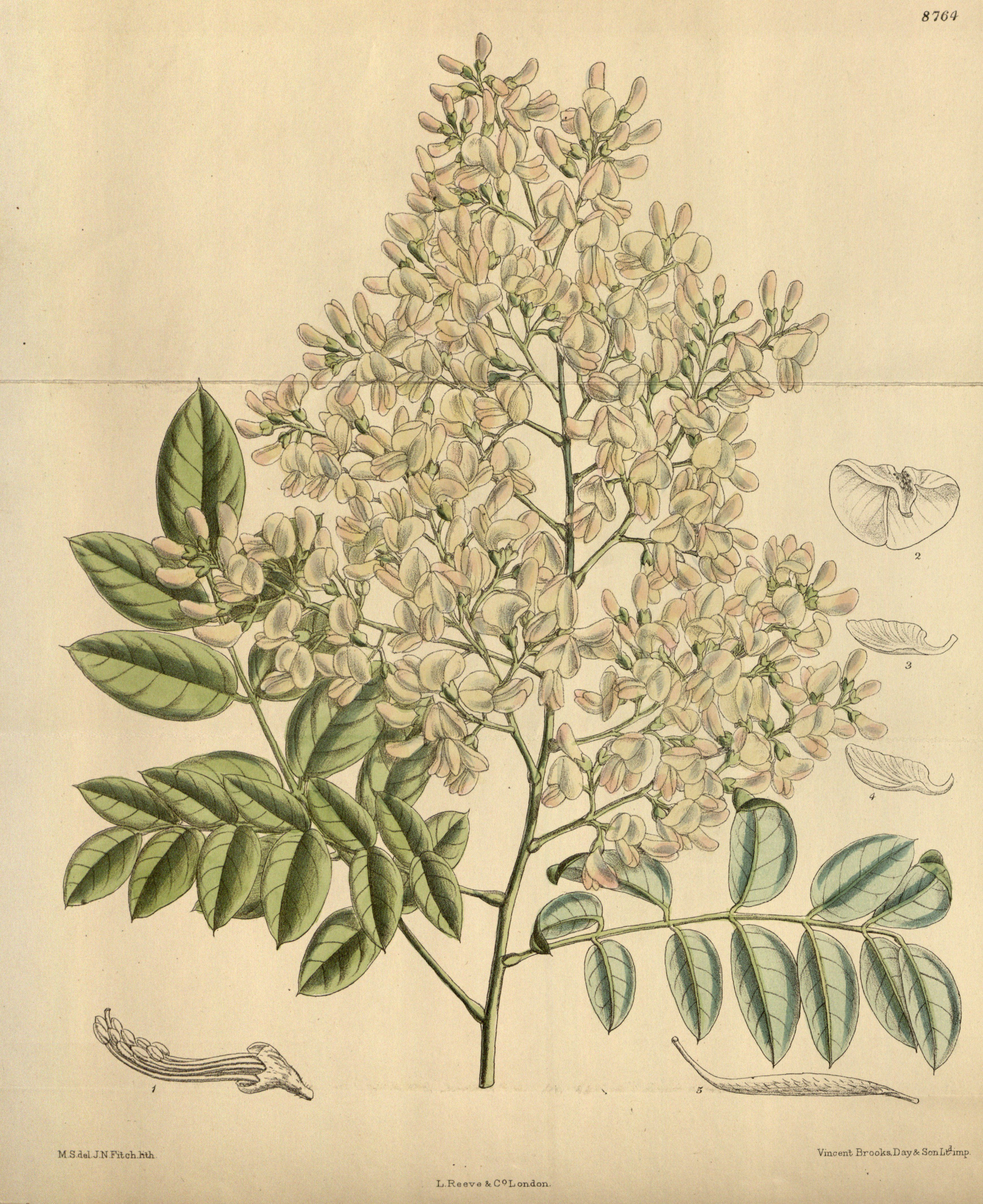 Sophora japonica (= Styphnolobium japonicum), Fabaceae